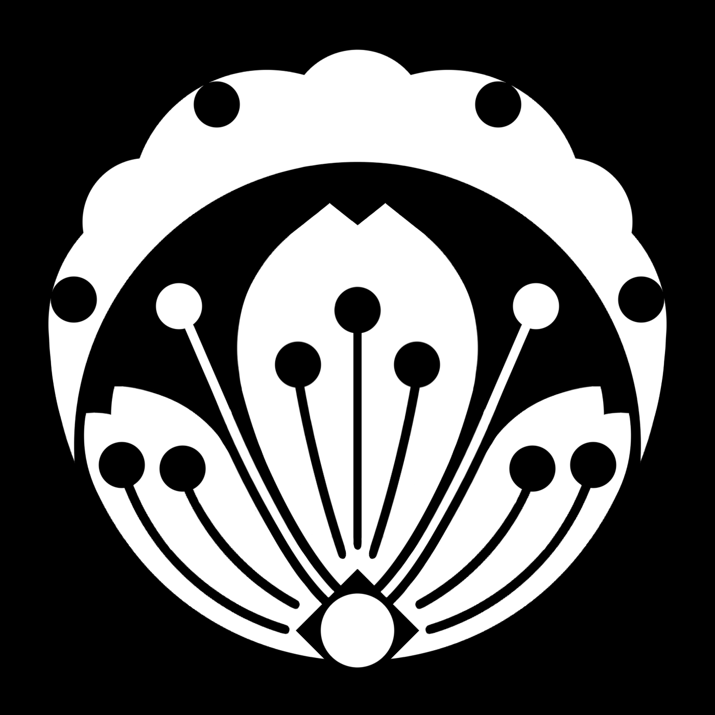 「新橋演舞場雪月花」紋（染抜）